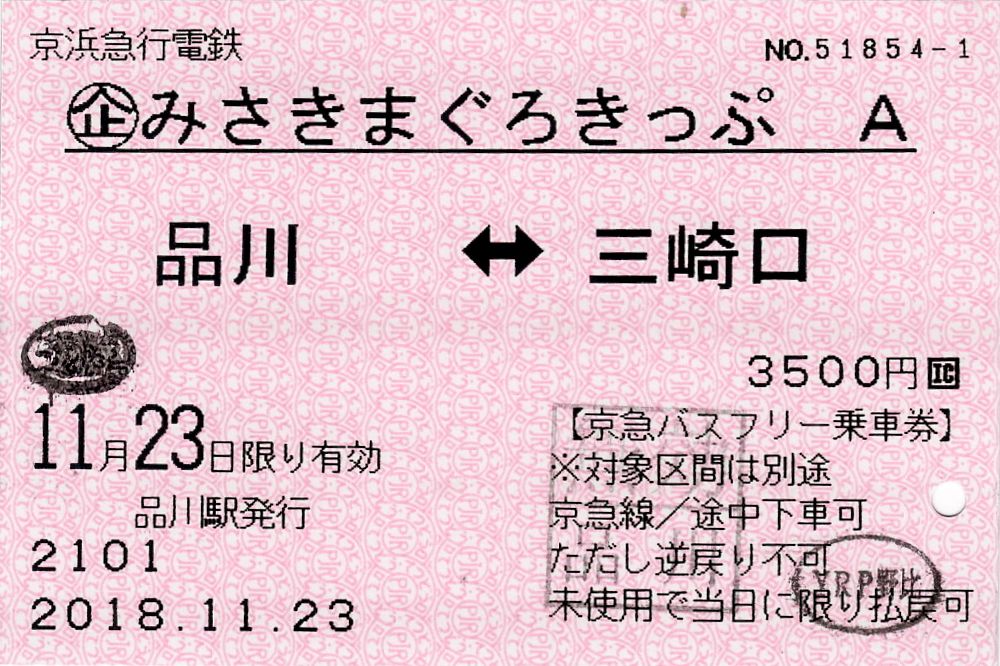 京浜急行電鉄発行 みさきまぐろきっぷ 本券